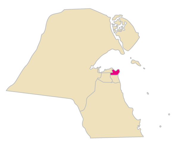 Hawalli